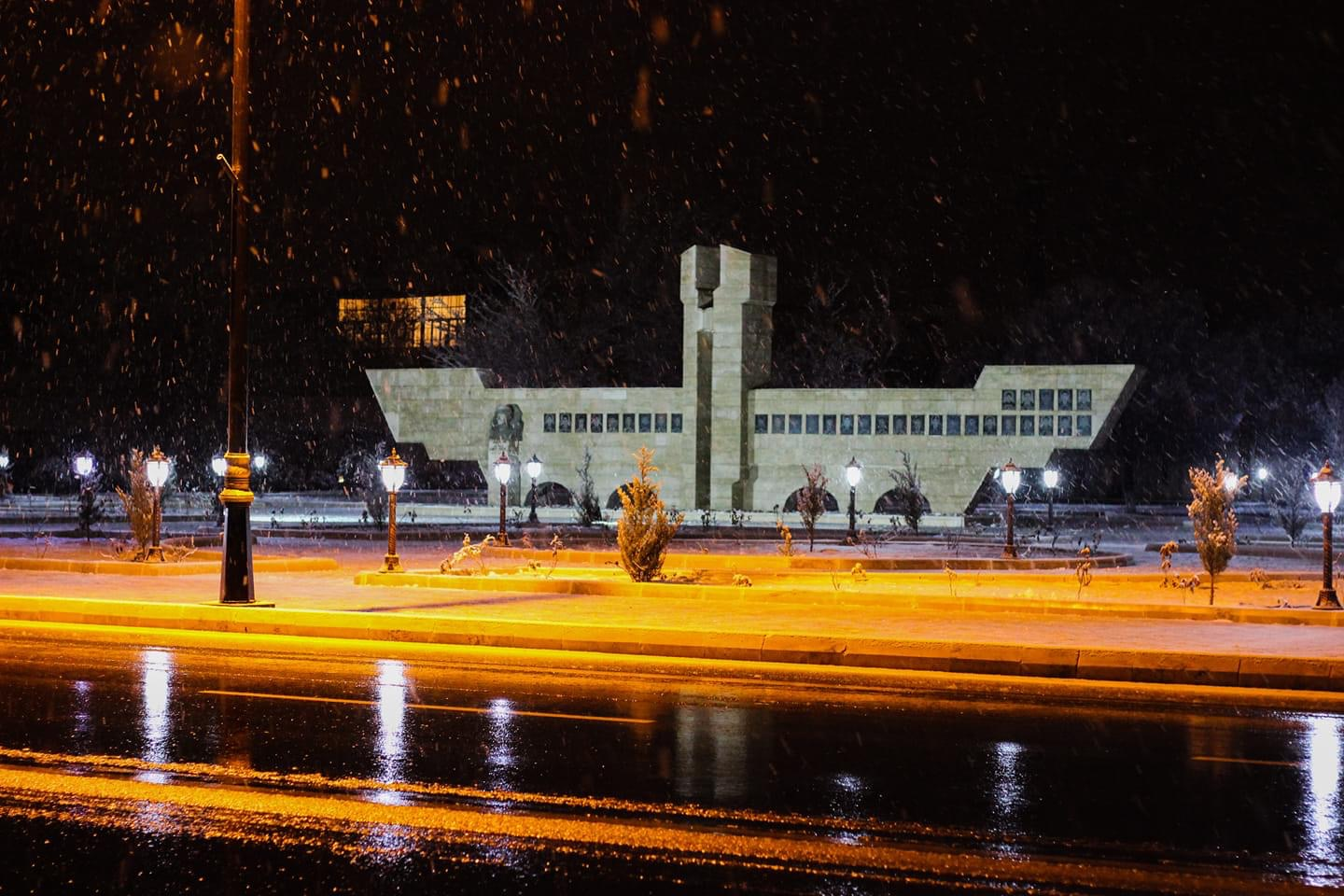 Şəhidlər Xiyabanı